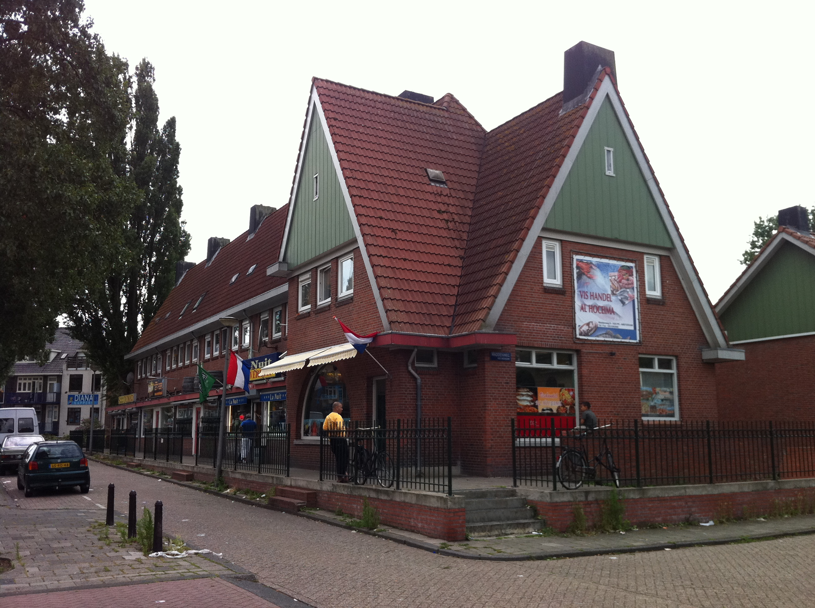 Tuindorp Buiksloot Amsterdam-Noord juli 2011